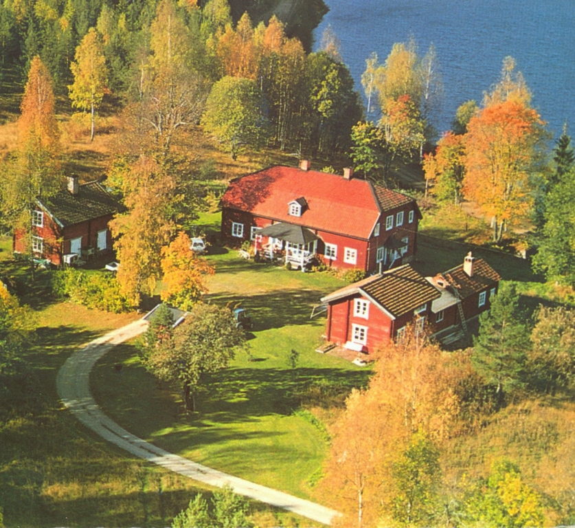 Min egen bild som också använts med mitt tillstånd av Stora Enso och Falu Rödfärg för vykort. Tommy Erixon Nyhyttans herrgård 73892 Norberg 0223-20407